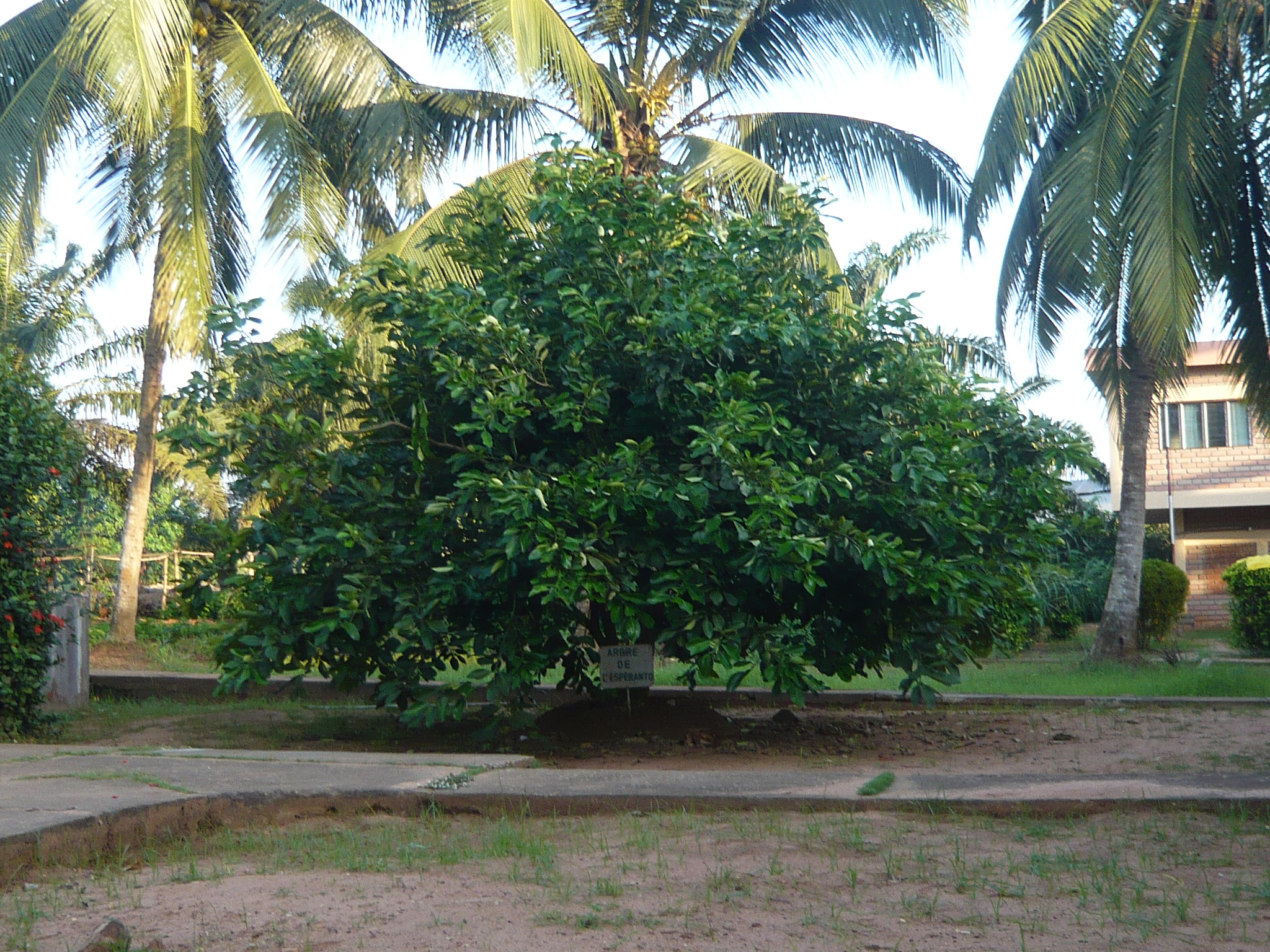 La ESPERANTO arbo estis plantita en julio 2008 en Centro Songhai en Porto Novo, Benino, okaze de la Tutmonda ILEI Konferenco. Staras ŝildo sub la arbo, en la franca: ARBRE DE L'ESPERANTO.